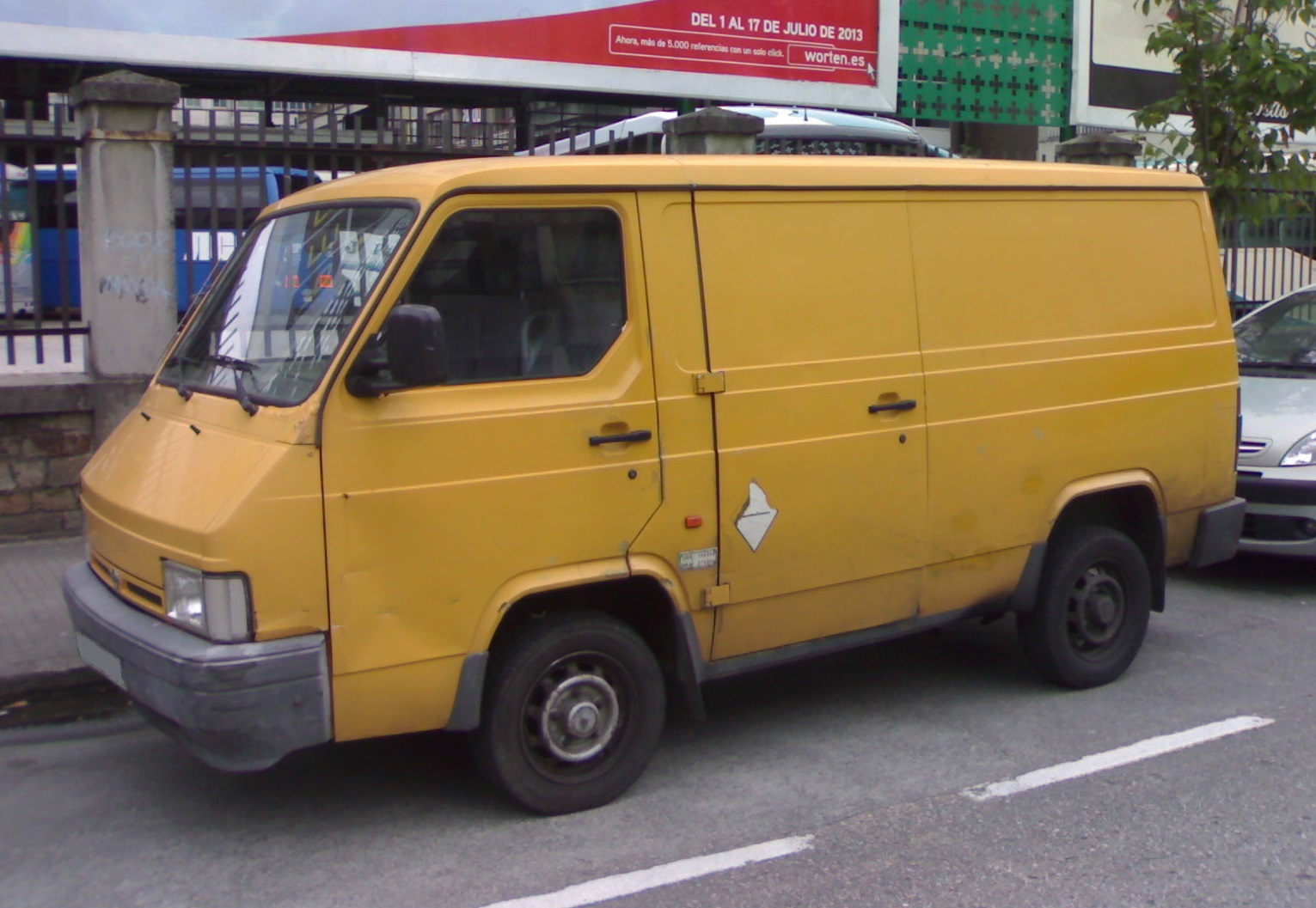 Furgoneta Nissan Trade en versión de 6 puertas.